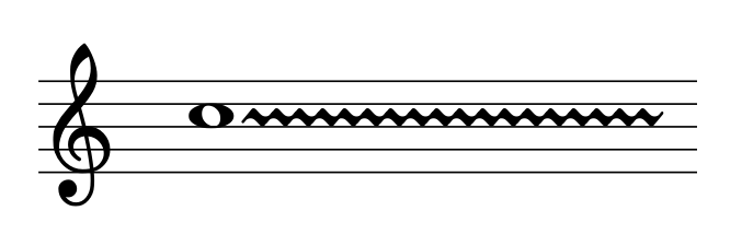 Handbell shake technique notation